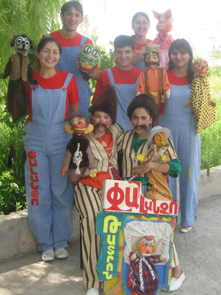 Փալանչոն ներկայացումից հետո